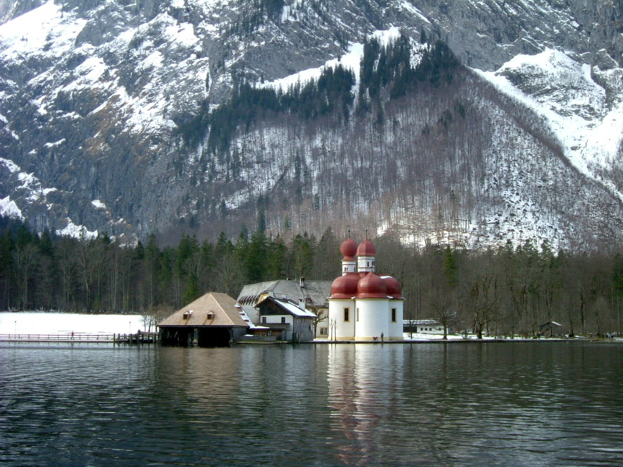 St. Bartholomä am KönigsseeThis is a photograph of an architectural monument.